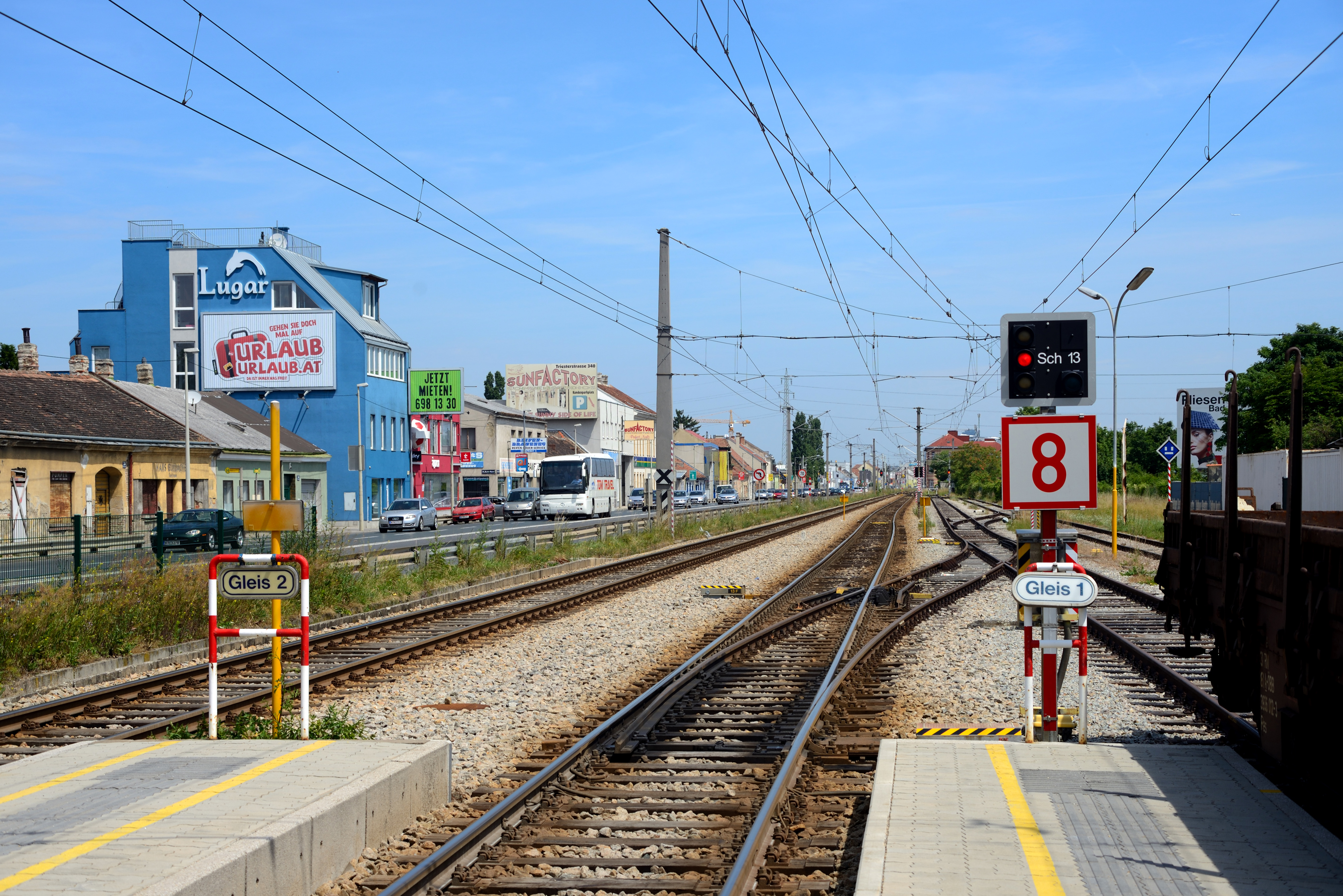 Bahnhof Vösendorf-Siebenhirten, nördlicher Teil